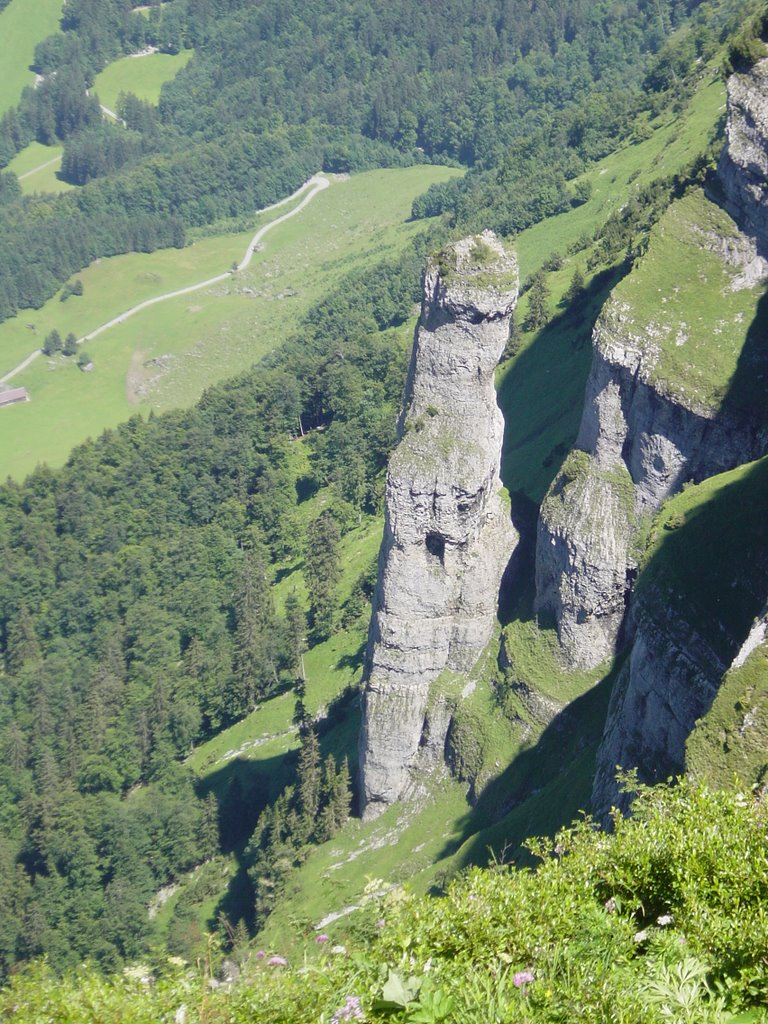 Blick vom Häle (Kanisfluh) auf die Wirmsäule